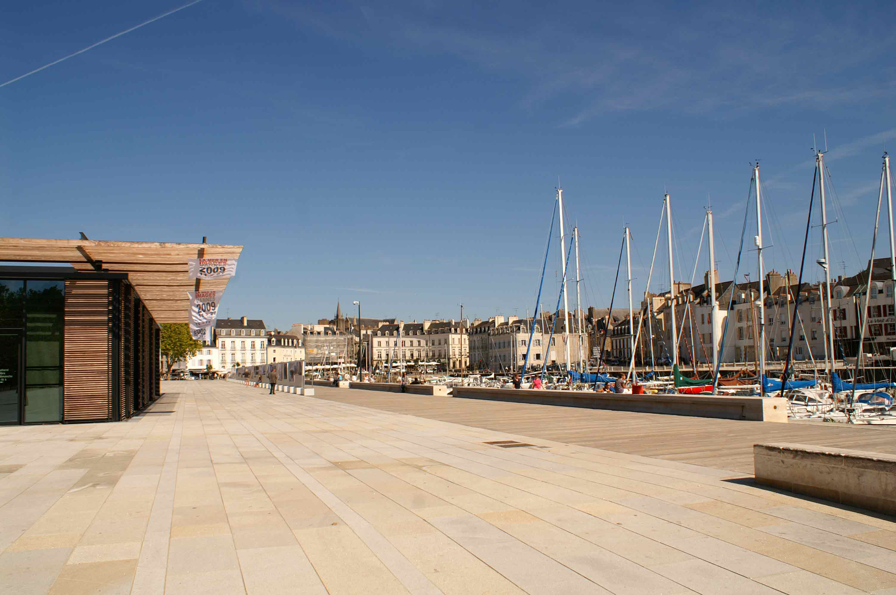 Vannes, la nouvelle esplanade du port avec l'un des deux kiosques d'exposition.